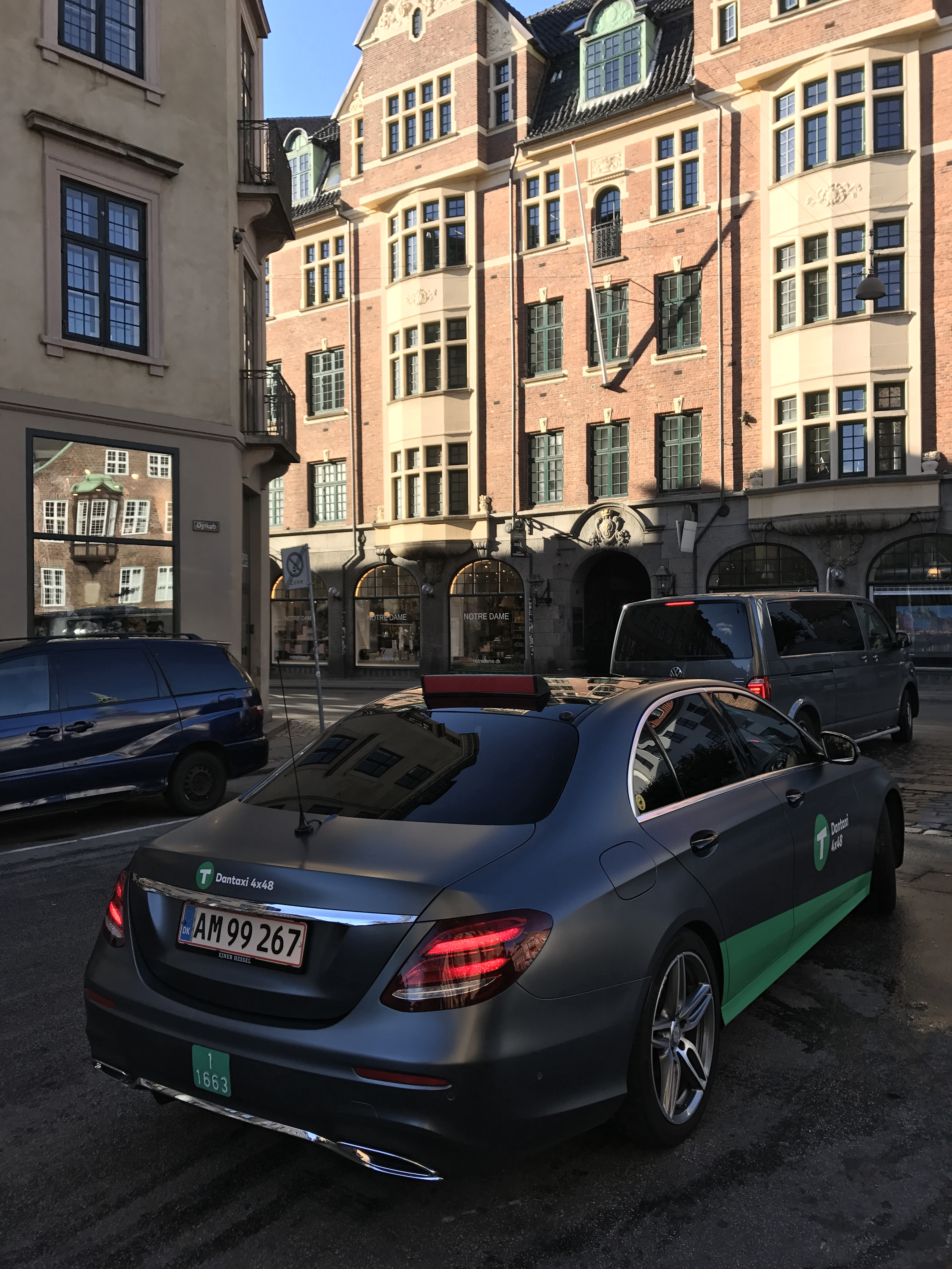 Dantaxi 4x48 med nyt logo. fotograferet i indre by København. Oktober 2017